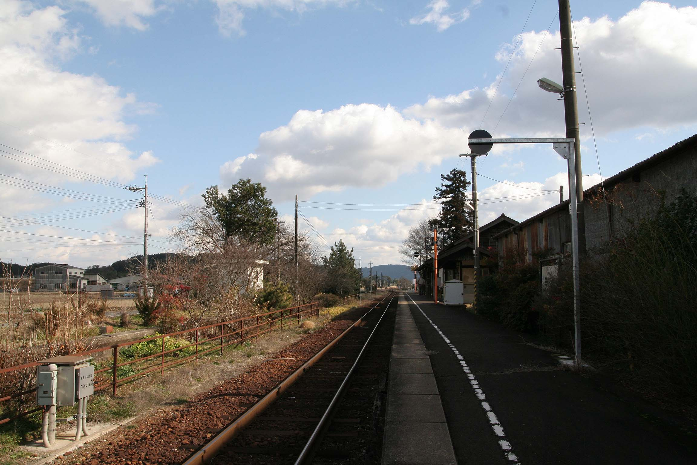 美作千代駅の構内